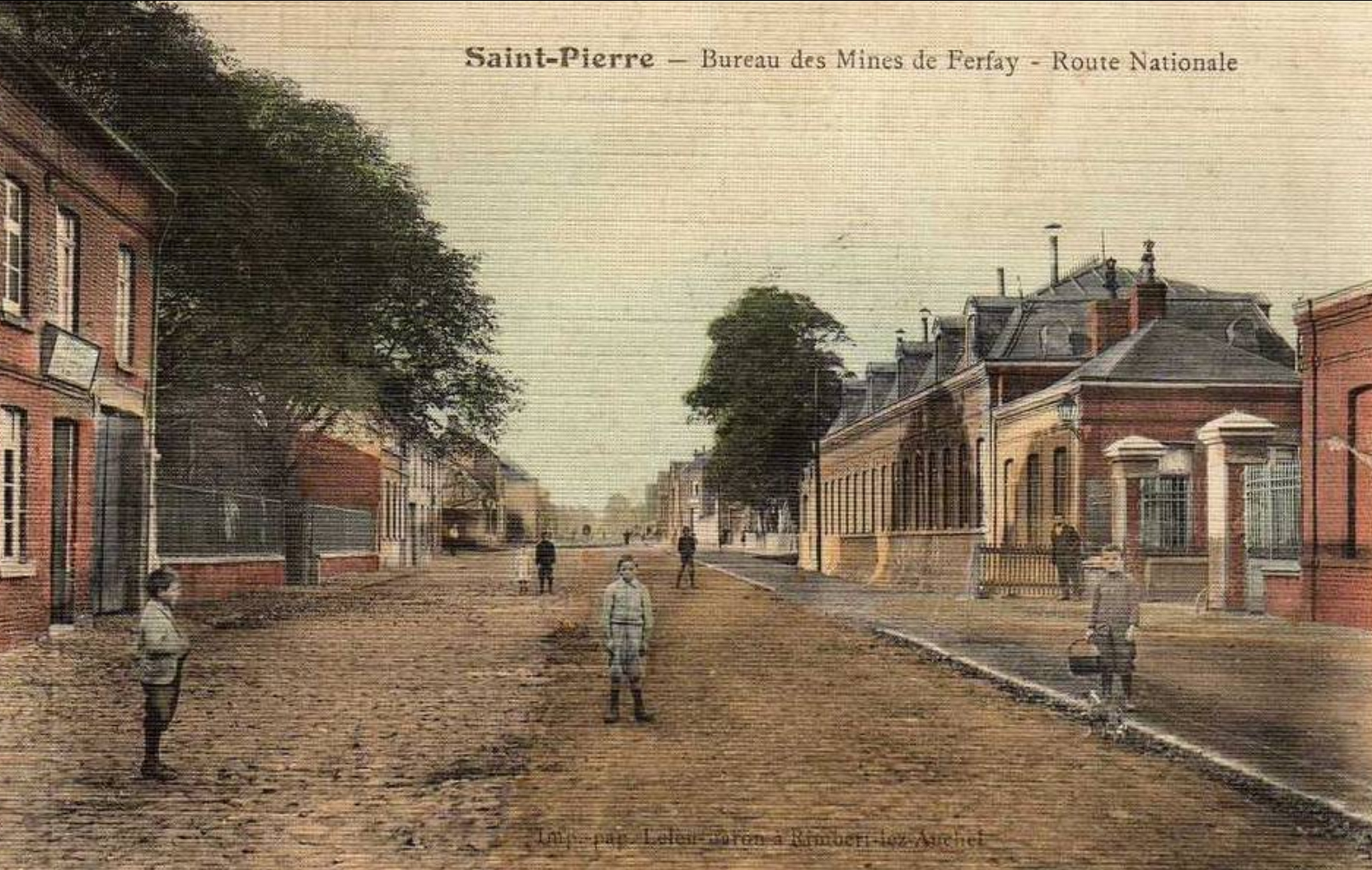 Grands bureaux de la Compagnie des mines de Ferfay dans le bassin minier du Nord-Pas-de-Calais, Auchel, Pas-de-Calais, Nord-Pas-de-Calais, France.